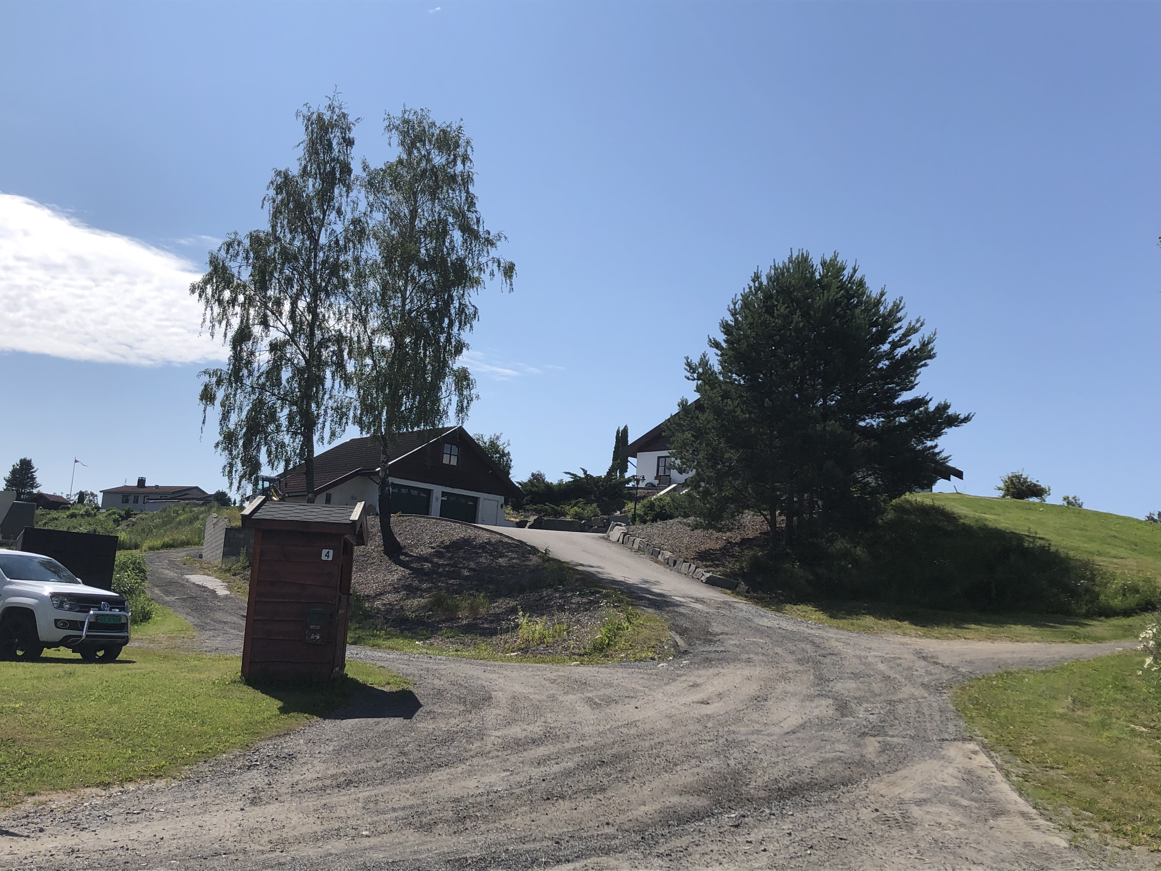 Kilealleen, Ringerike, ved avkjøringen fra Vestre Ådal.